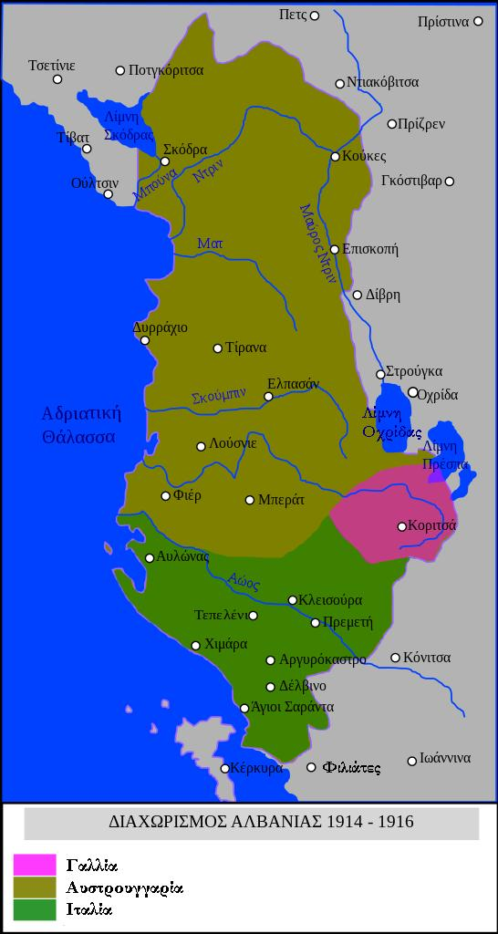 Ο Διαχωρισμός της Αλβανίας 1914-1916